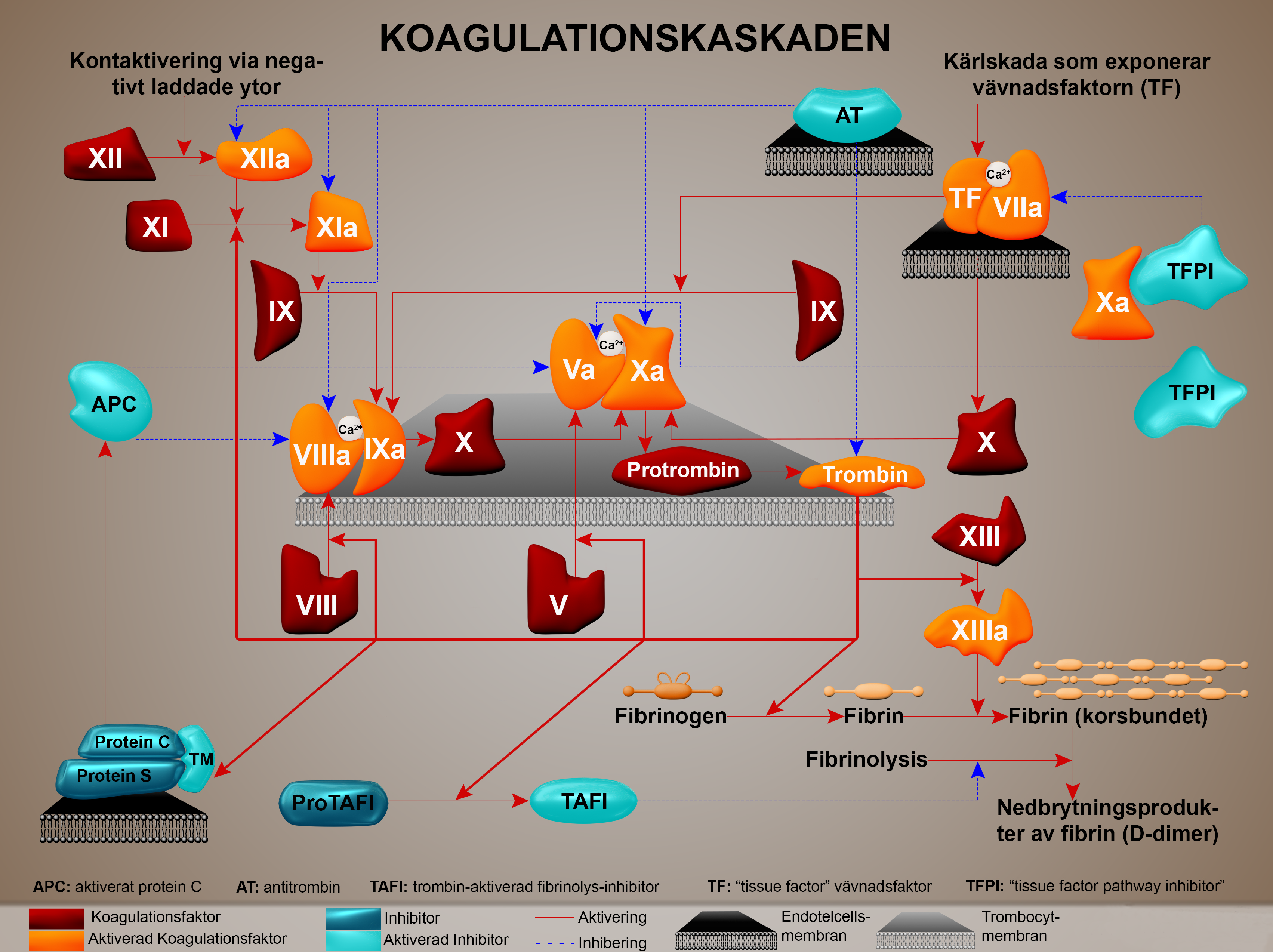 Deskriptiv bild av koagulationskaskaden med färgkodning.